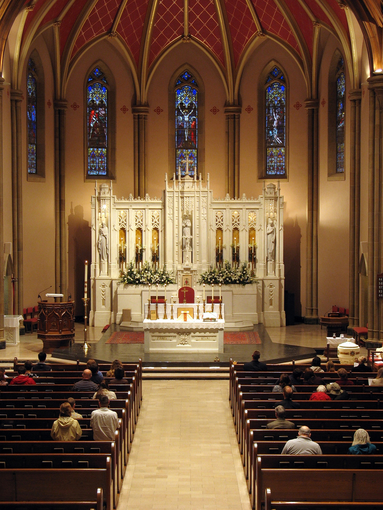 Cattedrale cattolica di San Giovanni Berchmans, a Shreveport, Louisiana (USA).